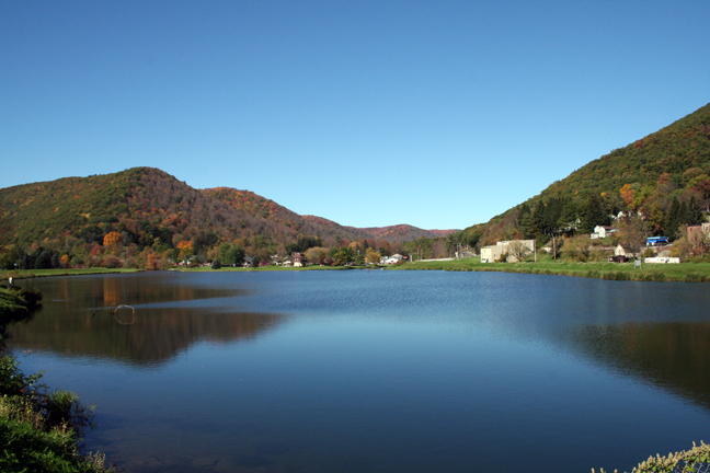 Berger Lake, Galeton, PA 16922